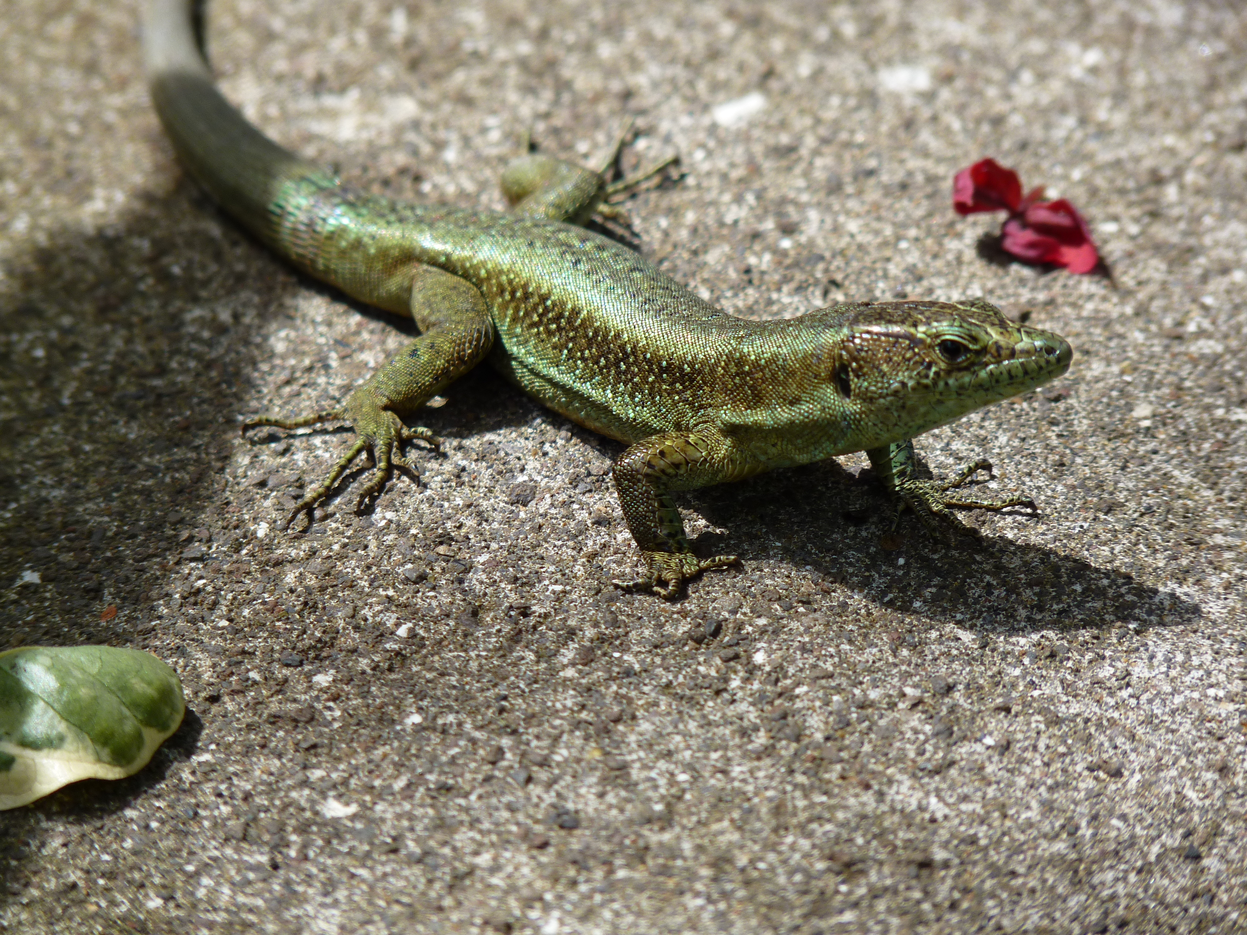 Lizard, Madeira